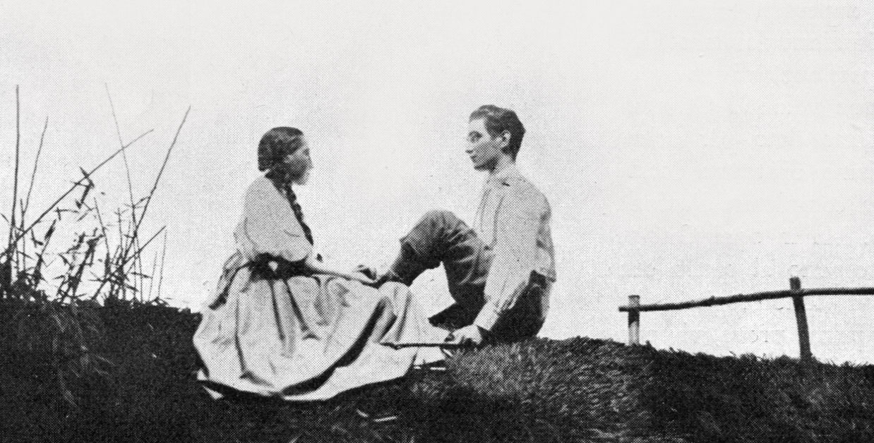 Una scena da Mio fratello il ciliegio di Siro Lombardi - Teatro Sperimentale del GUF di Firenze, dicembre 1937. regia di Francesco Pasinetti